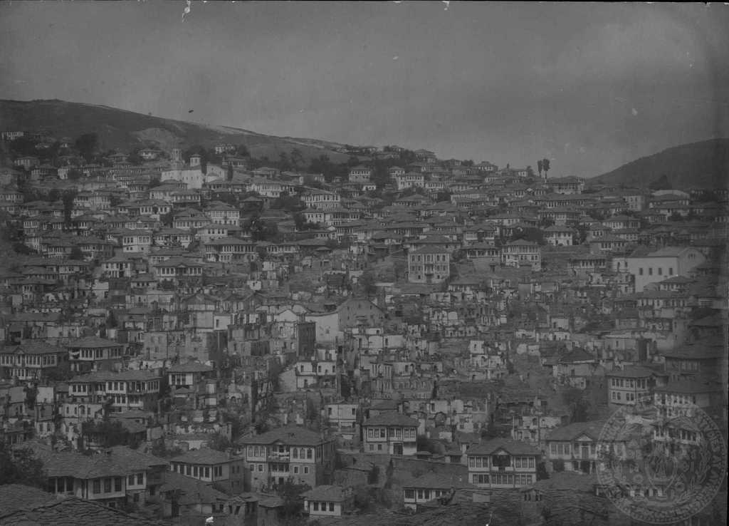 Крушево